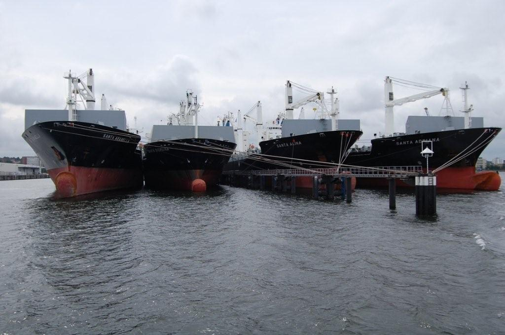 Auflieger in Kiel